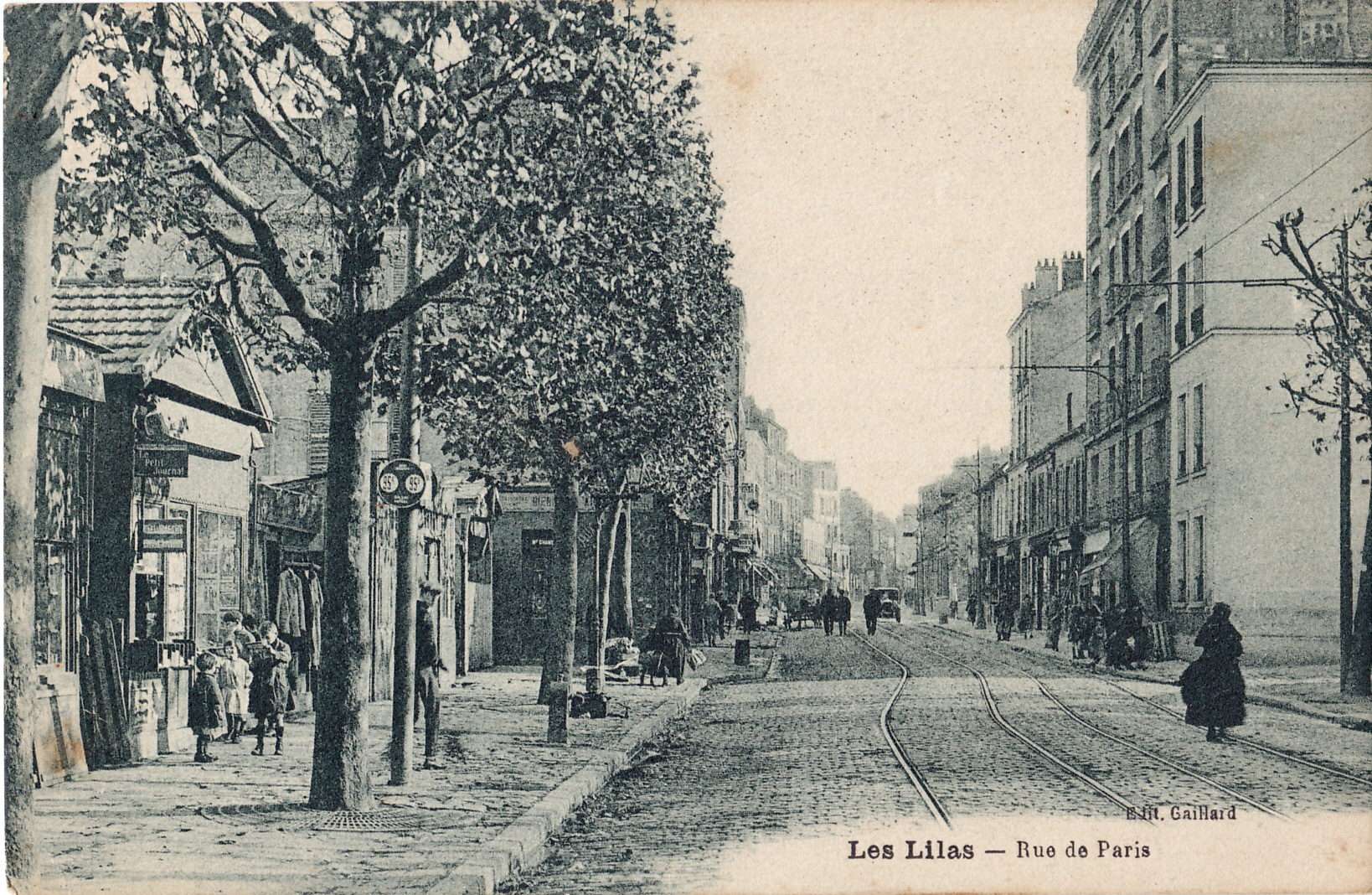 Carte postale ancienne éditée par Gaillard :LES LILAS - Rue de Paris